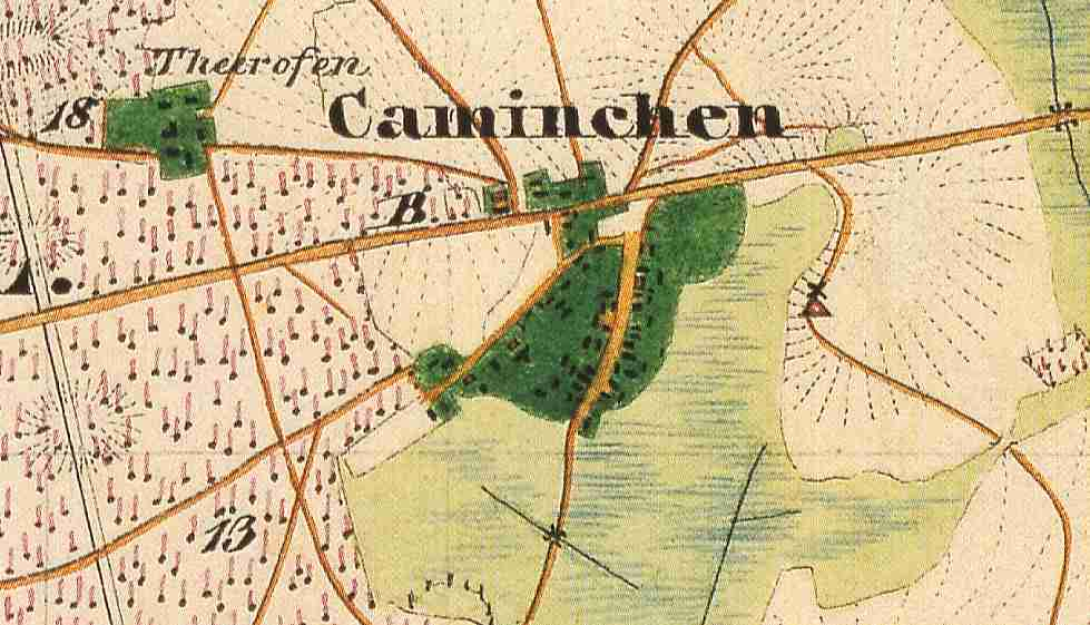 Caminchen, Ortsteil der Gemeinde Neu Zauche, Landkreis Dahme-Spreewald, Brandenburg, Deutschland, Ausschnitt aus dem Urmesstischblatt 4050 Straupitz von 1846